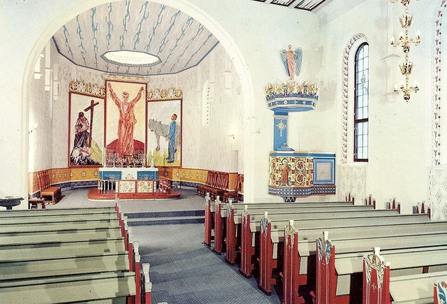 Hamar domkirke interiør